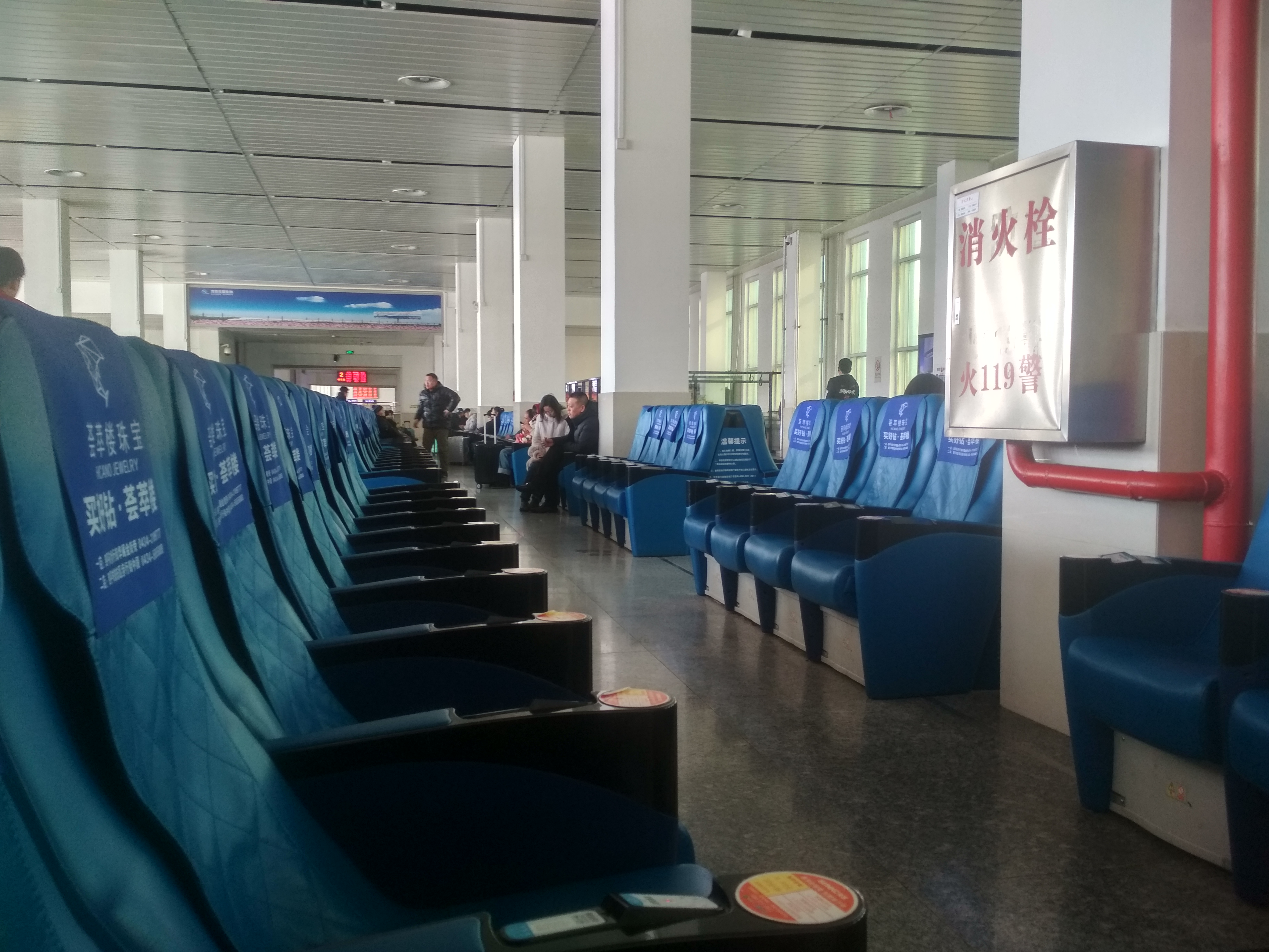 中文（中国大陆）: 中国吉林四平火车站一号候车大厅